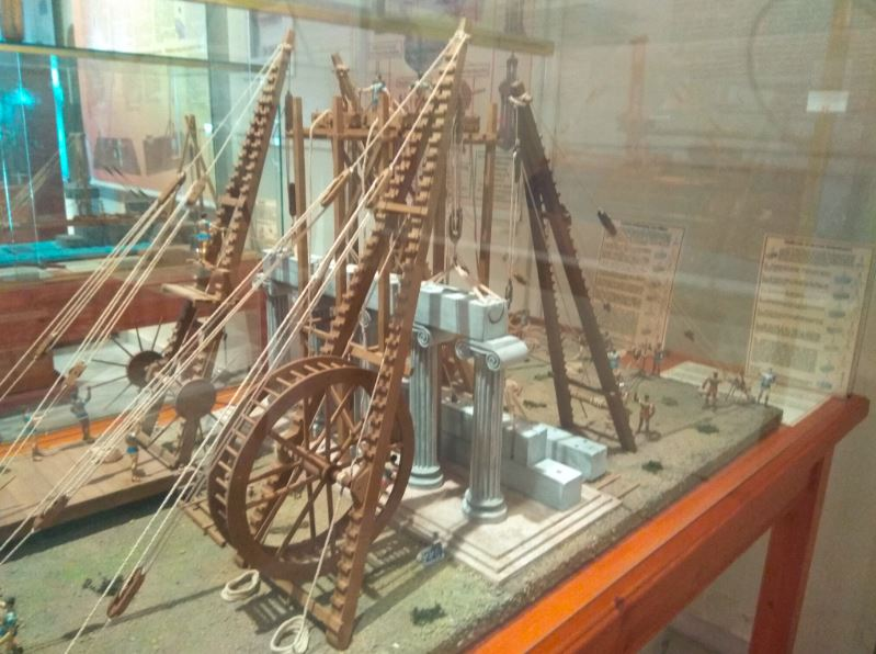 דגם של מנוף מהעת העתיקה